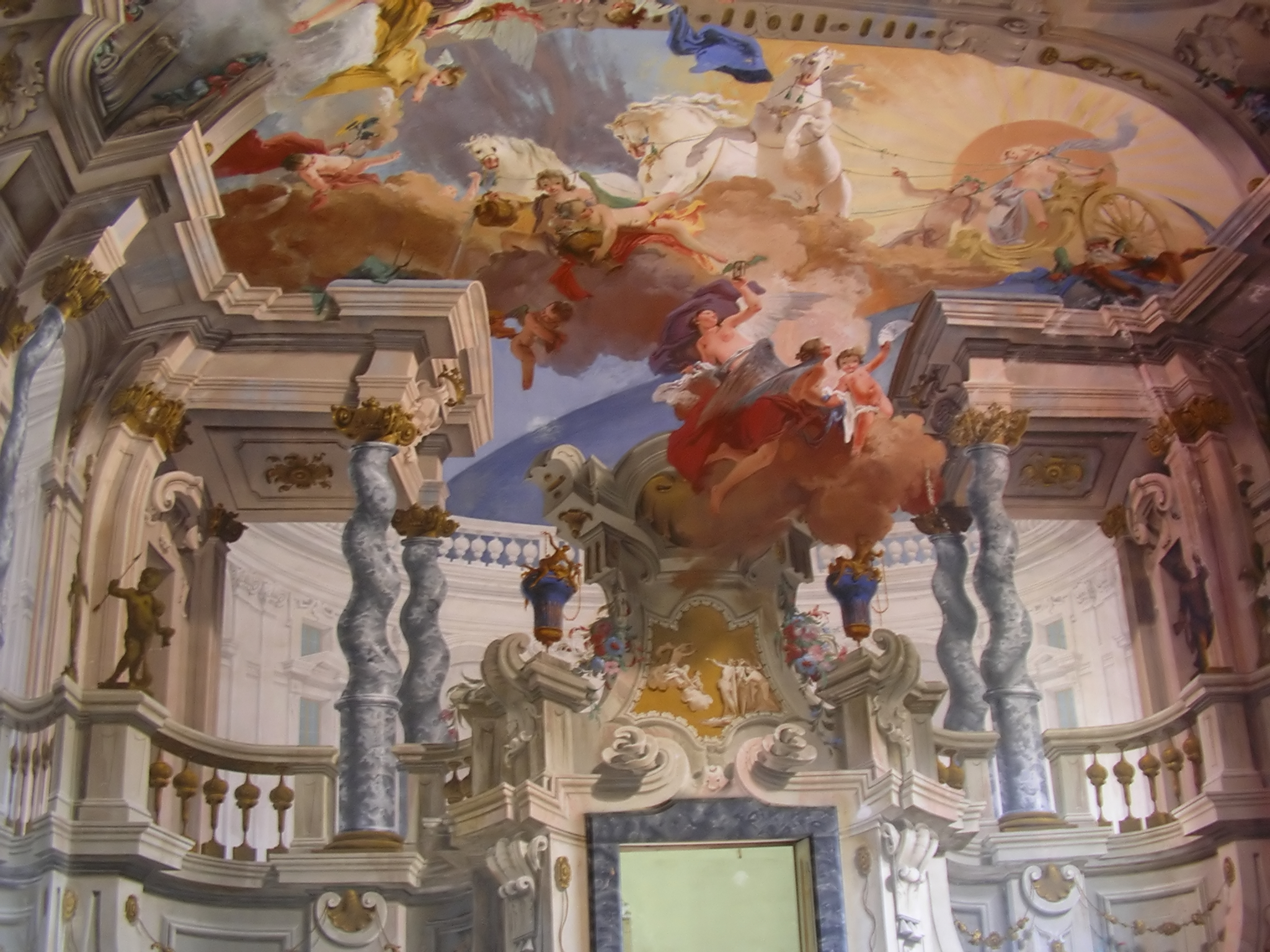 Affresco con il caro del sole guidato da Apollo fra architetture trompe-l'oeil, eseguito dai fratelli Galliari a partire dal 1750 nella Villa Arconati a Castellazzo di Bollate (MI).